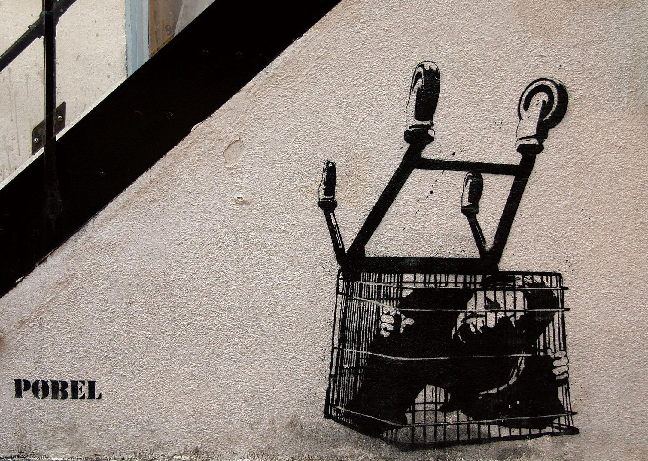 Stencil av Pøbel i Strøket/Torggata i Oslo